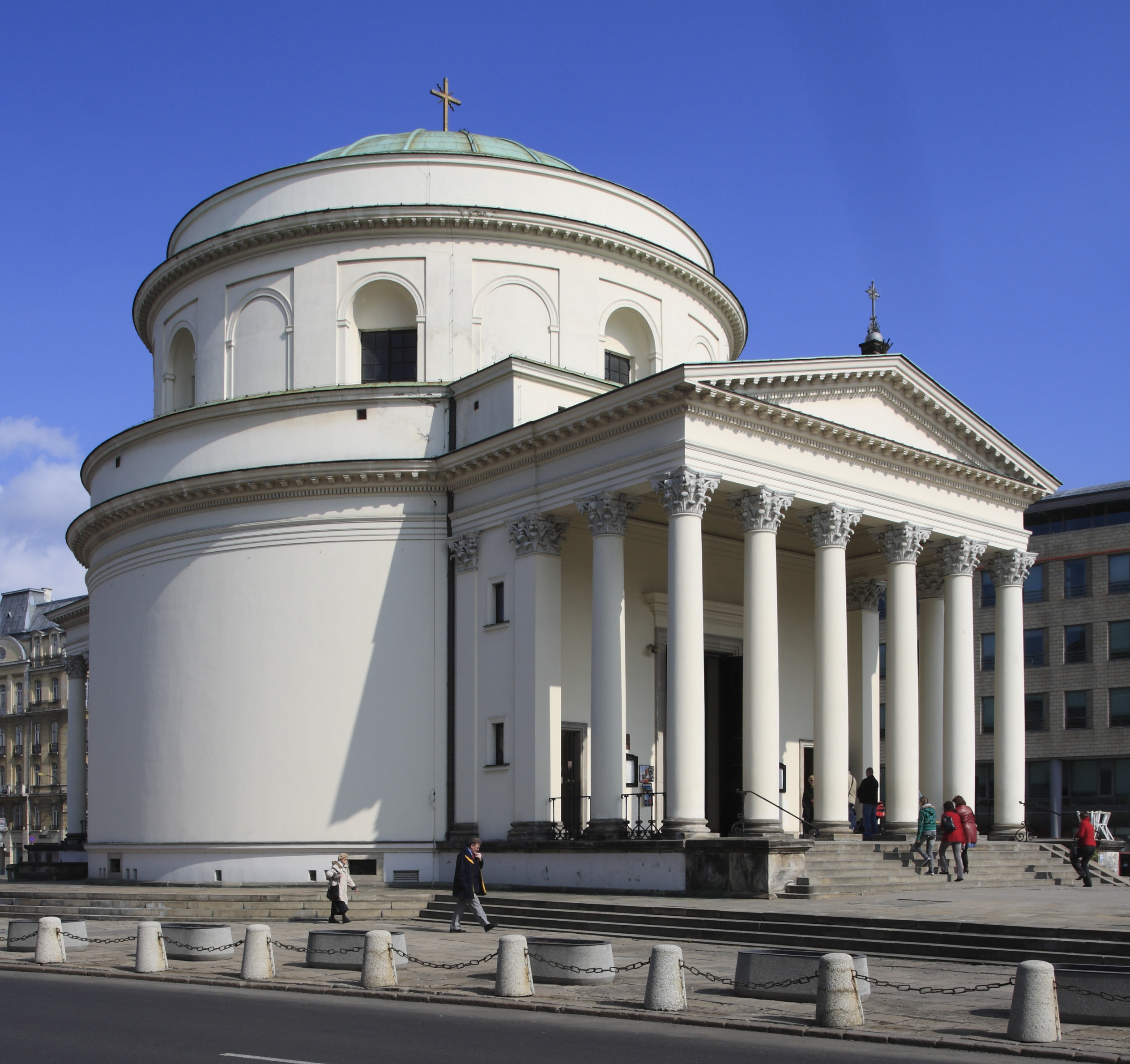 Kościół św. Aleksandra w Warszawie, plac Trzech Krzyży